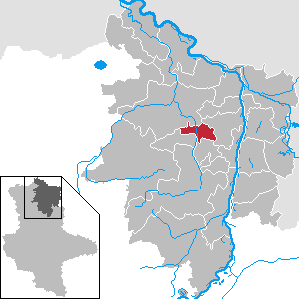 Goldbeck im Landkreis Stendal, Sachsen-Anhalt